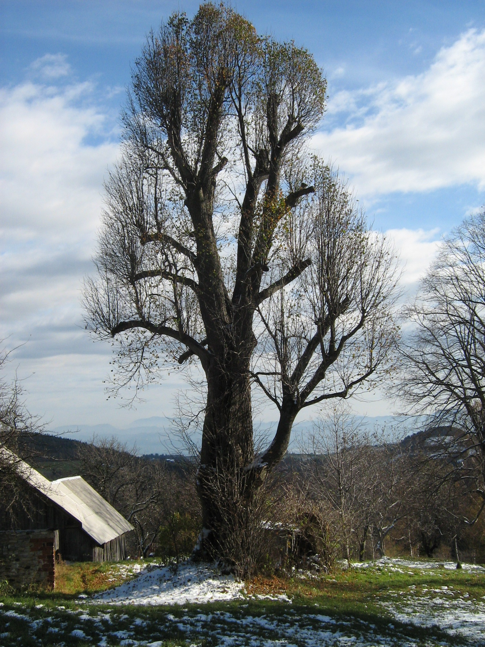 Termotova lipa v Bojtini